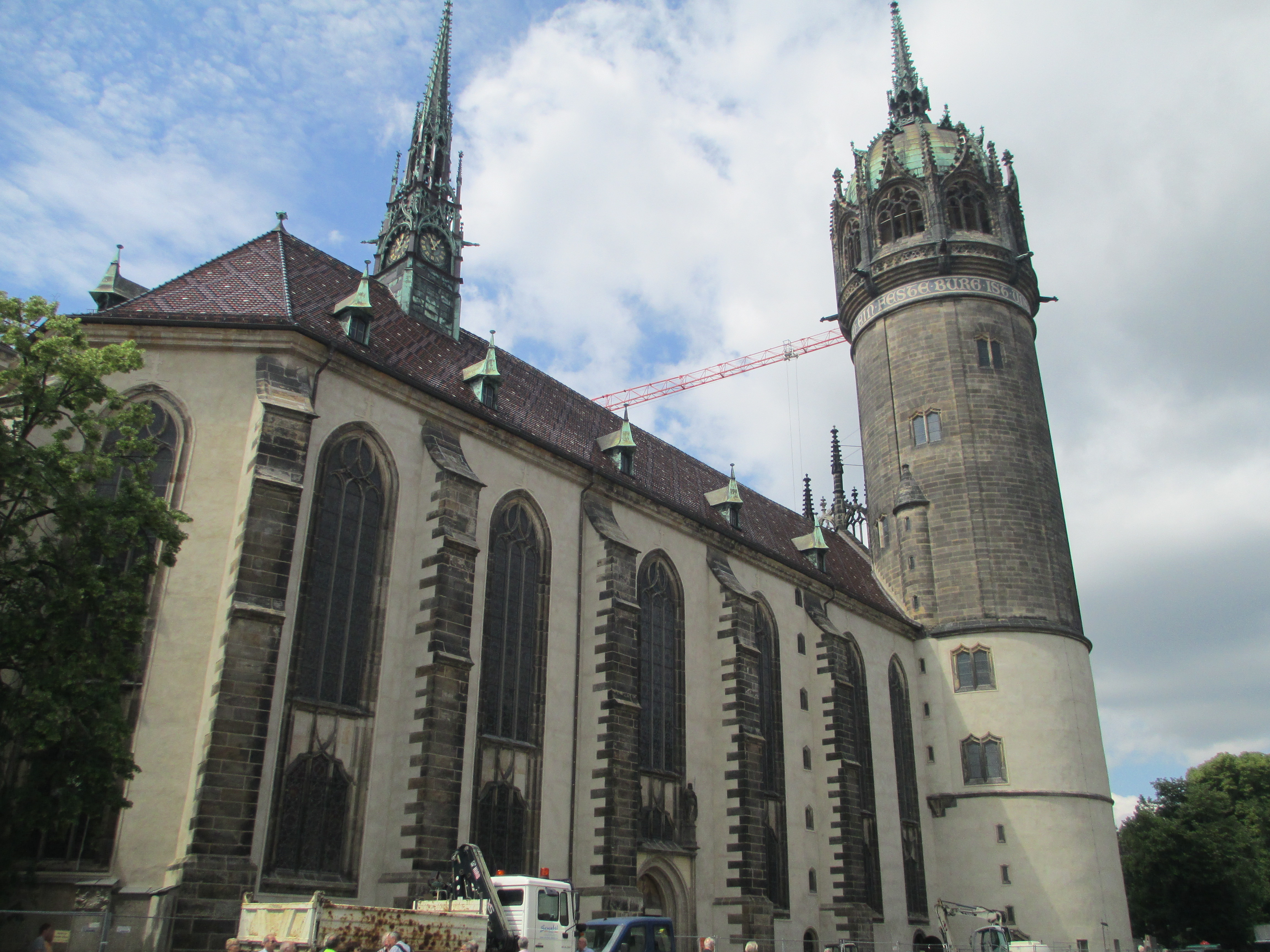 כנסיית הטירה (כל הקדושים) בוויטנברג